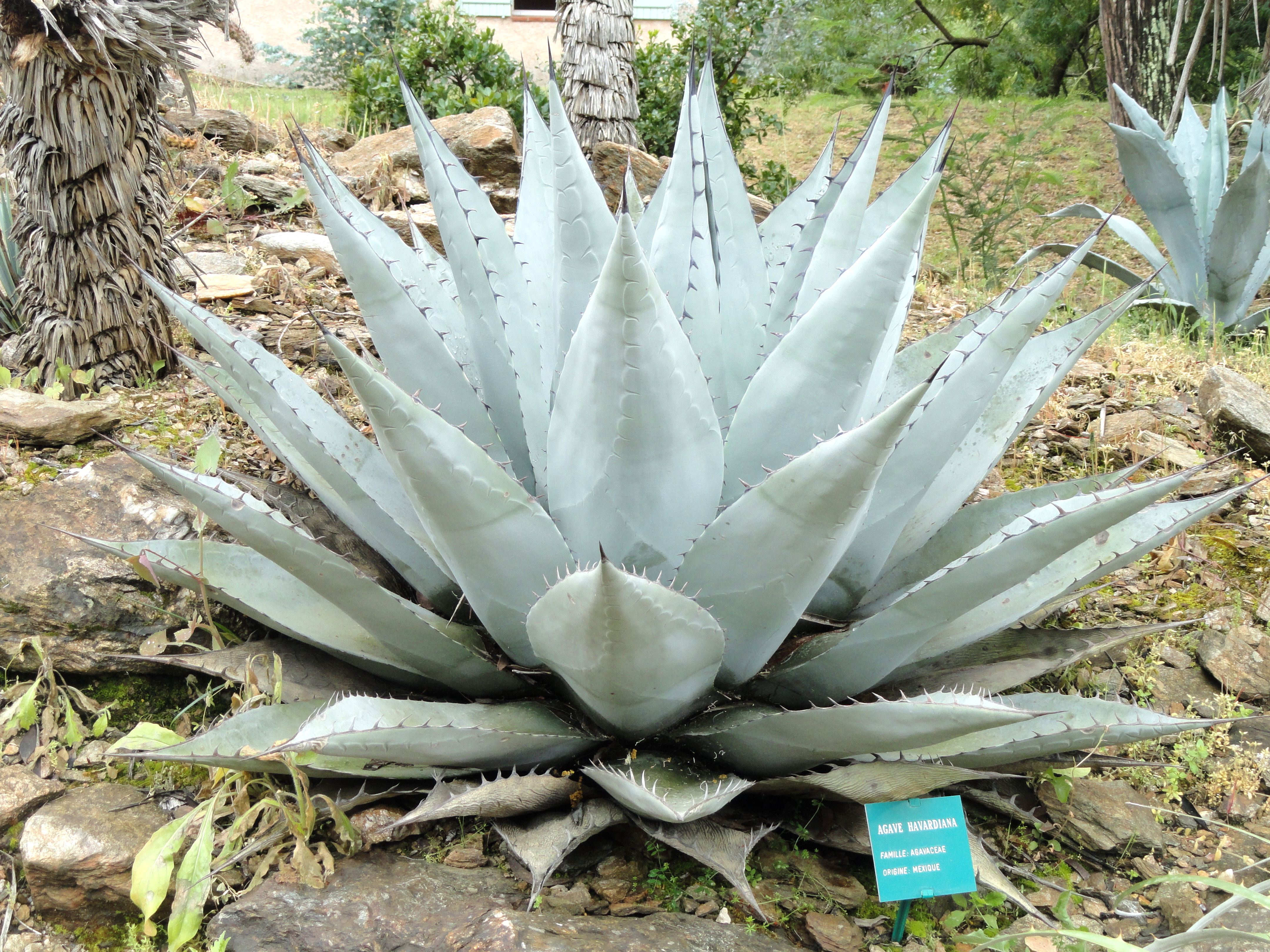 Agave havardiana specimen in the Jardin d'oiseaux tropicaux, La Londe-les-Maures, France.